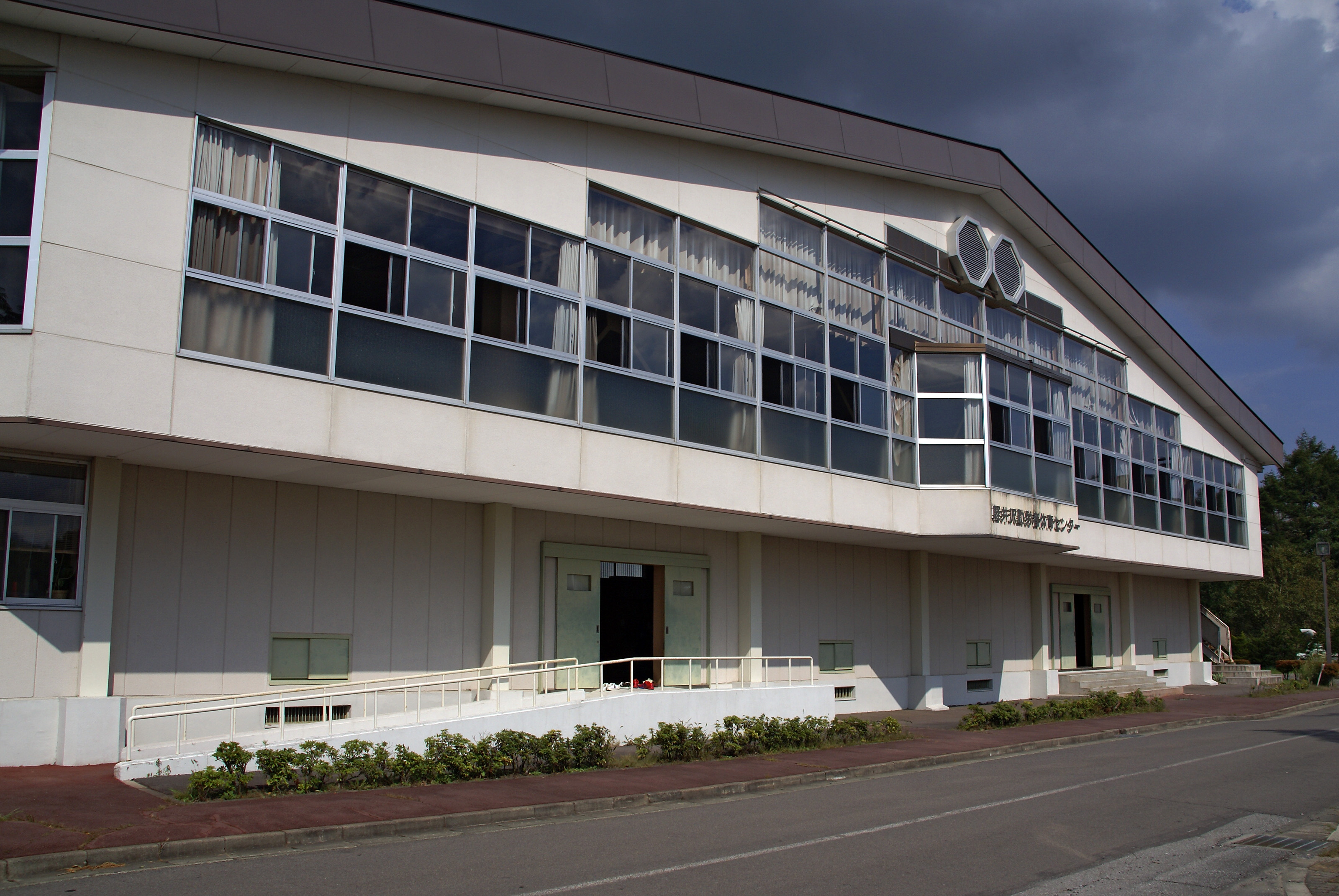 Kazakoshi Park in Karuizawa, Nagano prefecture, Japan